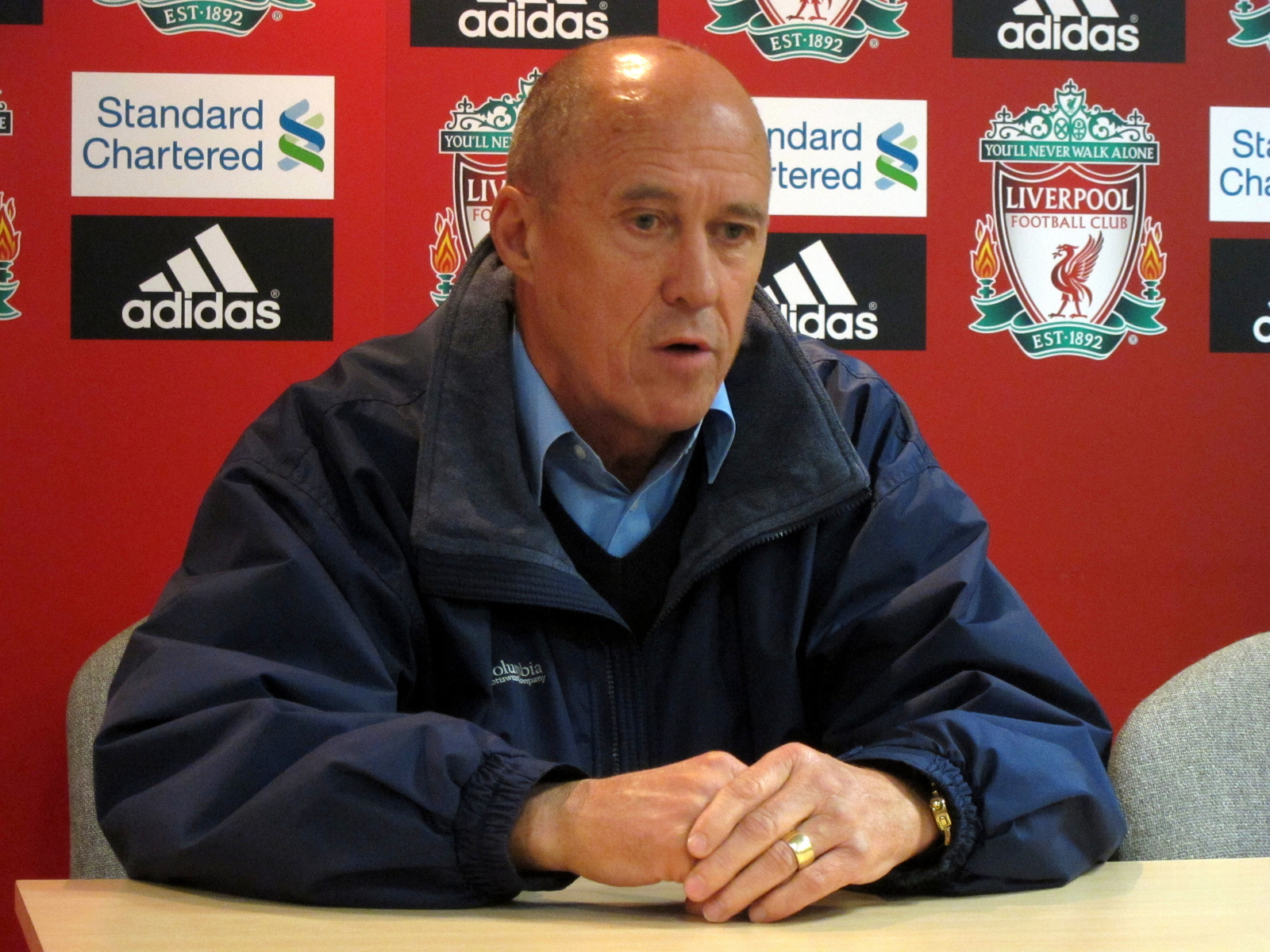 Engels voetbalspeler